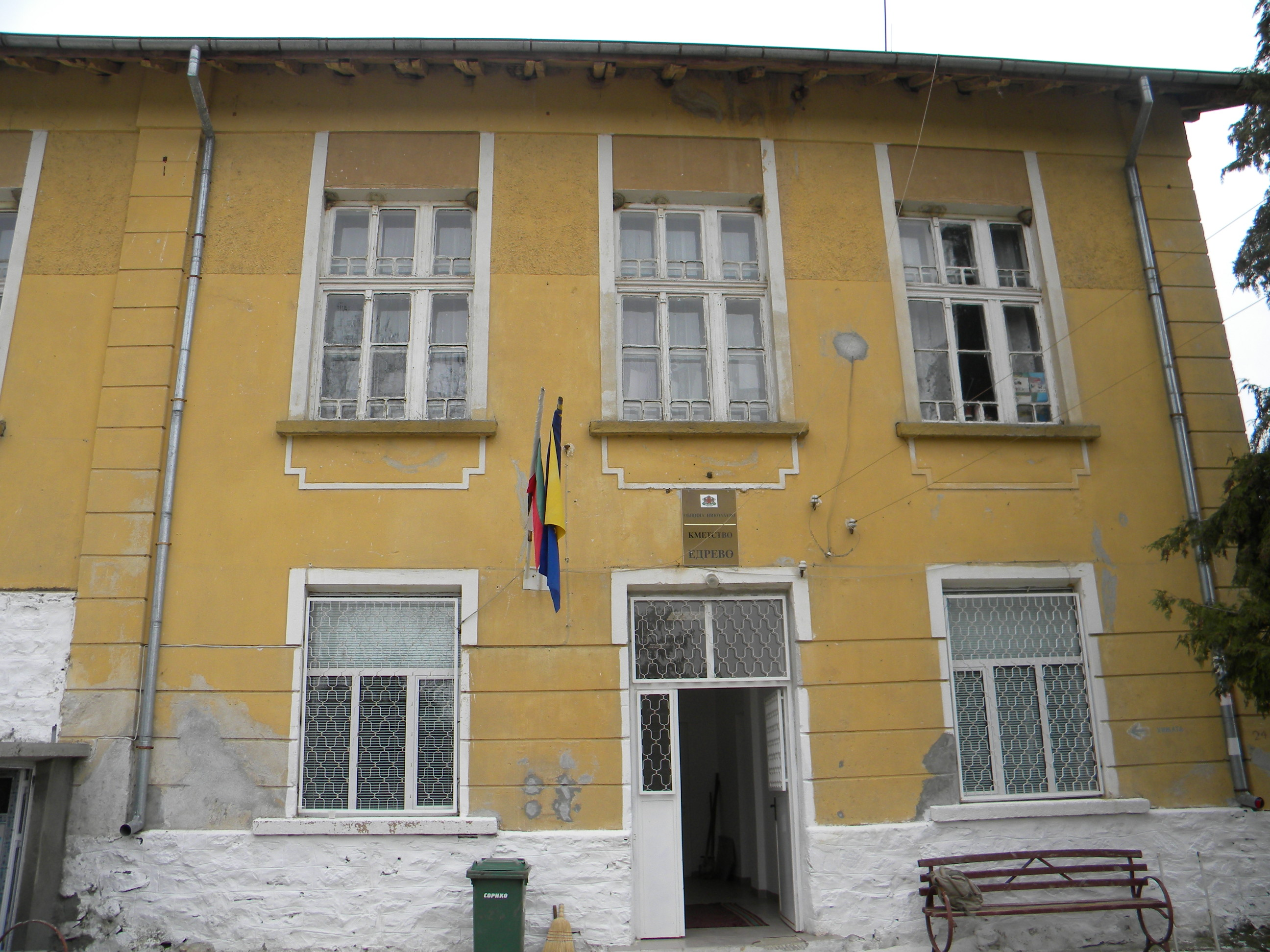 Кметството в село Едрево